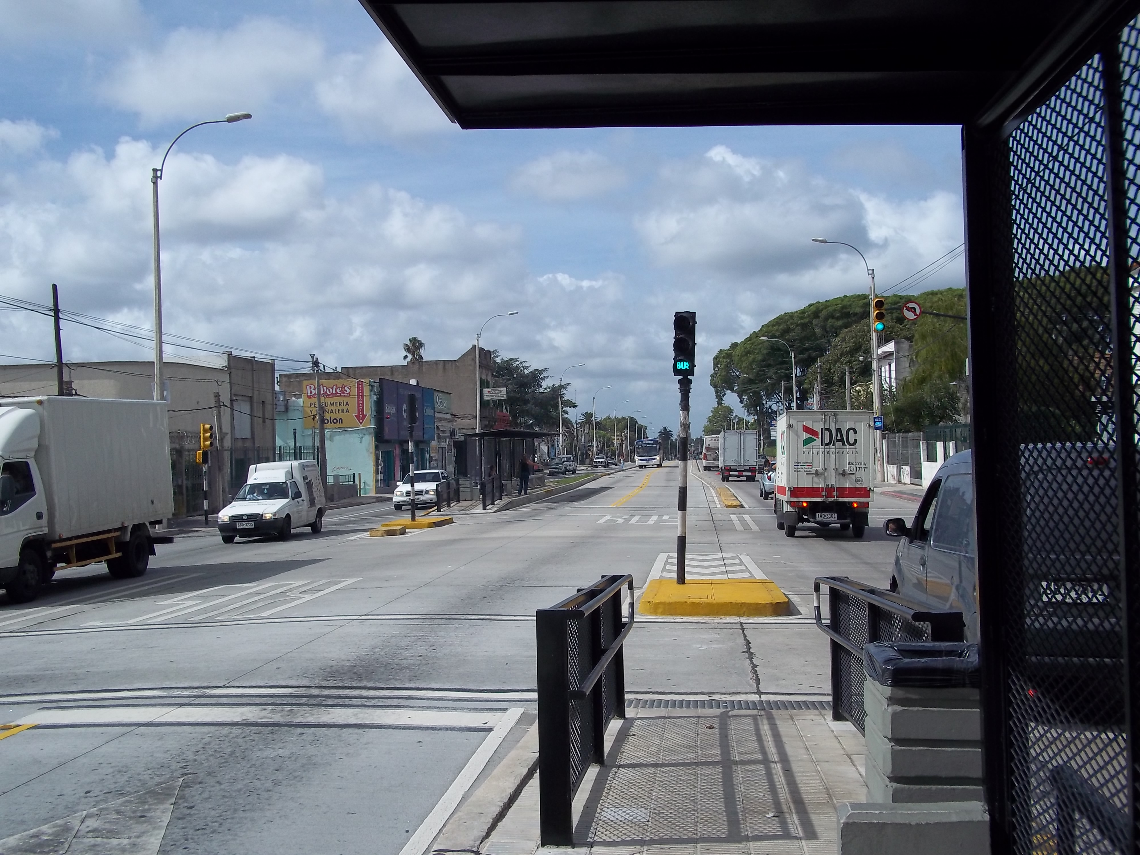 Parada de ómnibus en el Corredor Garzón, Montevideo